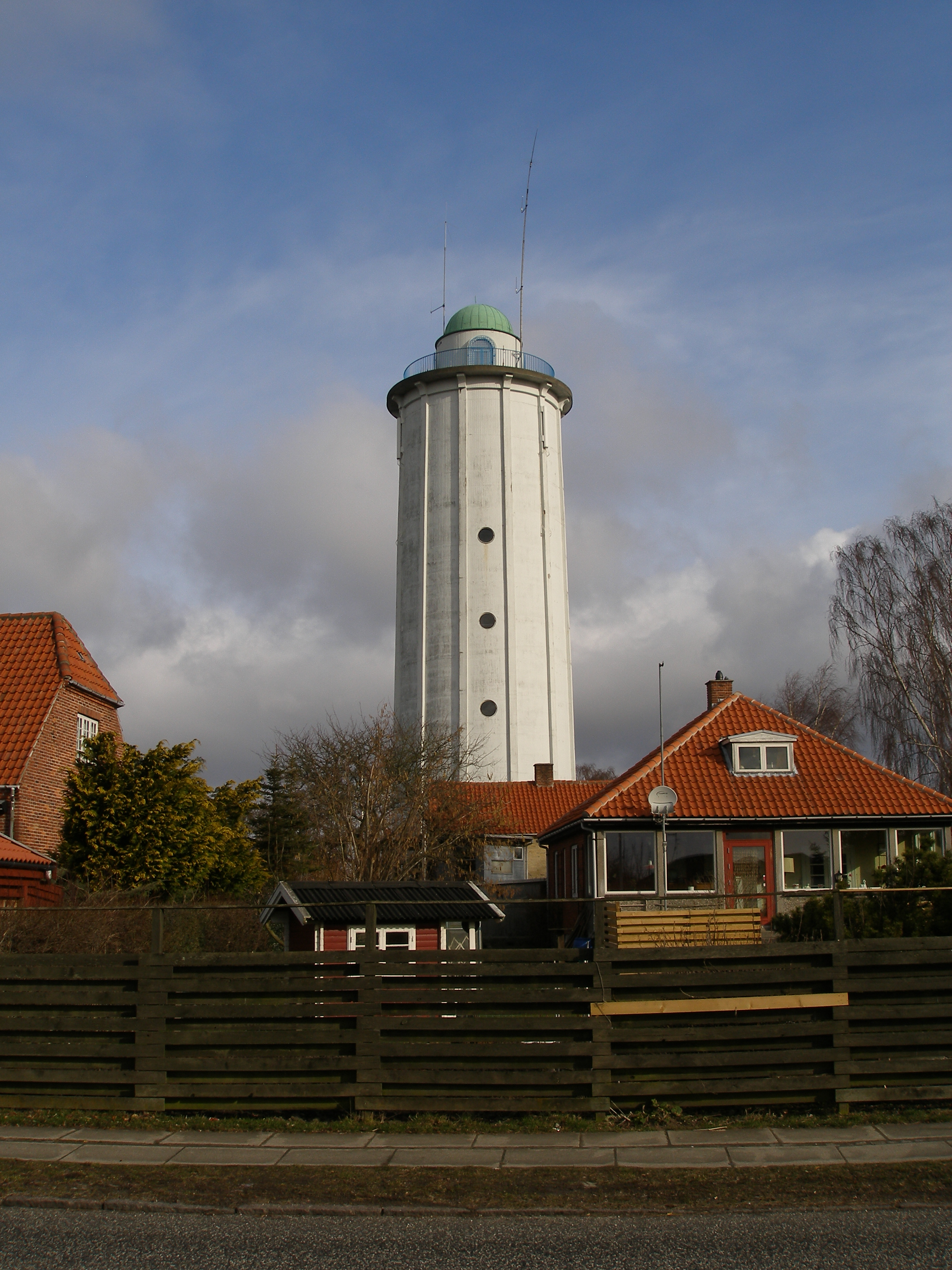 Hvidovre Vandtårn fra 1937